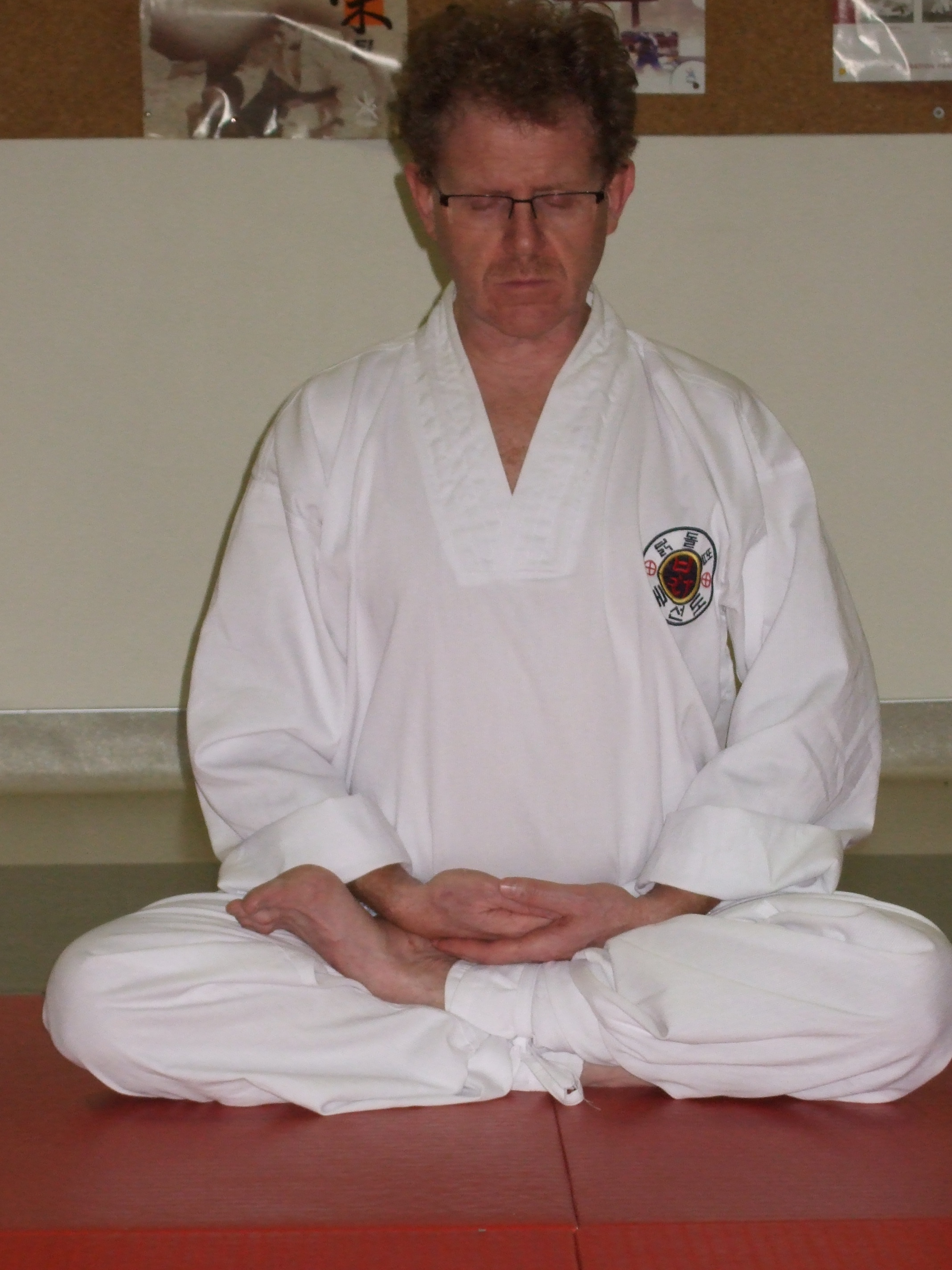 Philippe Lewkowicz stage à Nancy